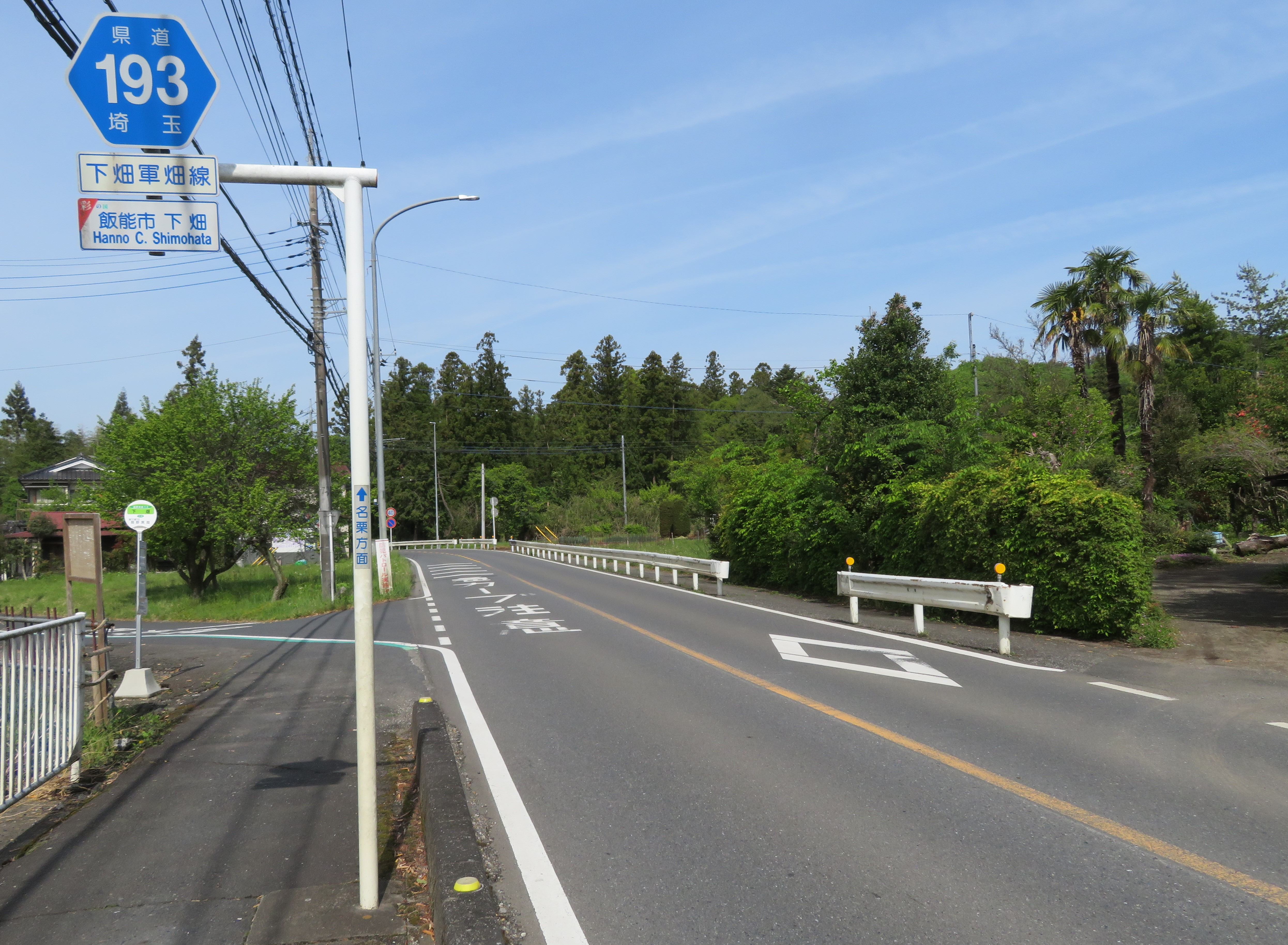 埼玉県道193号線飯能市下畑付近（沢井方面を撮影） Canon PowerShot SX720 HS